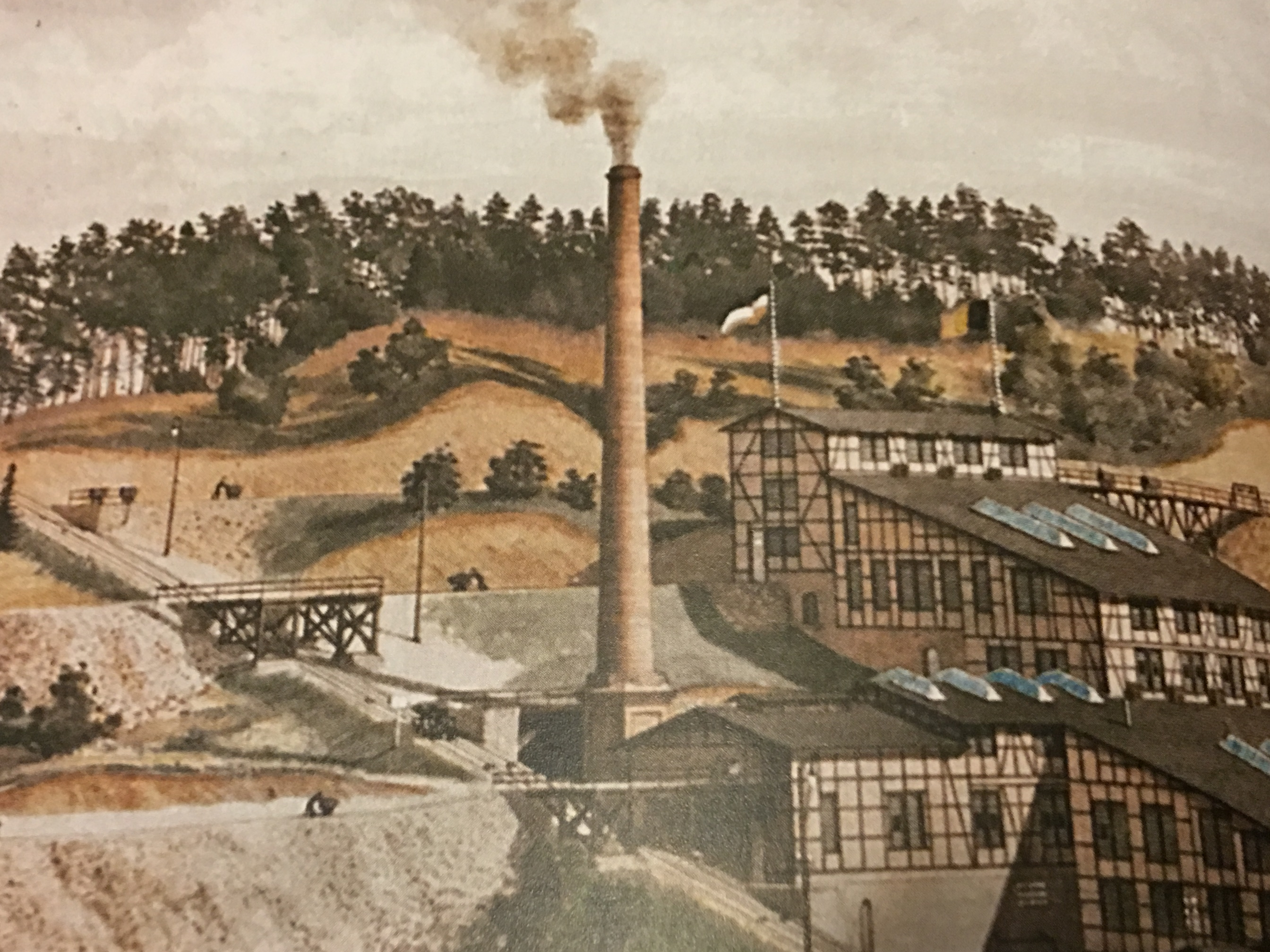 Ausschnitt von einem Aquarell-Gemälde von Wilhelm Scheiner, das die Grube Lüderich darstellt